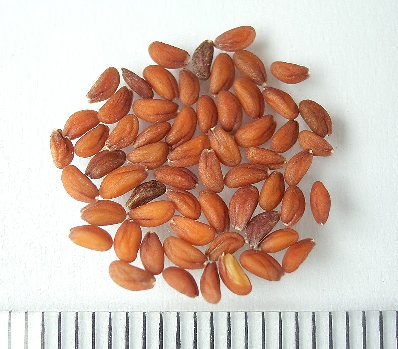 Lepidium sativum